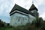 Kirche von Drăușeni / Draas in Rumänien